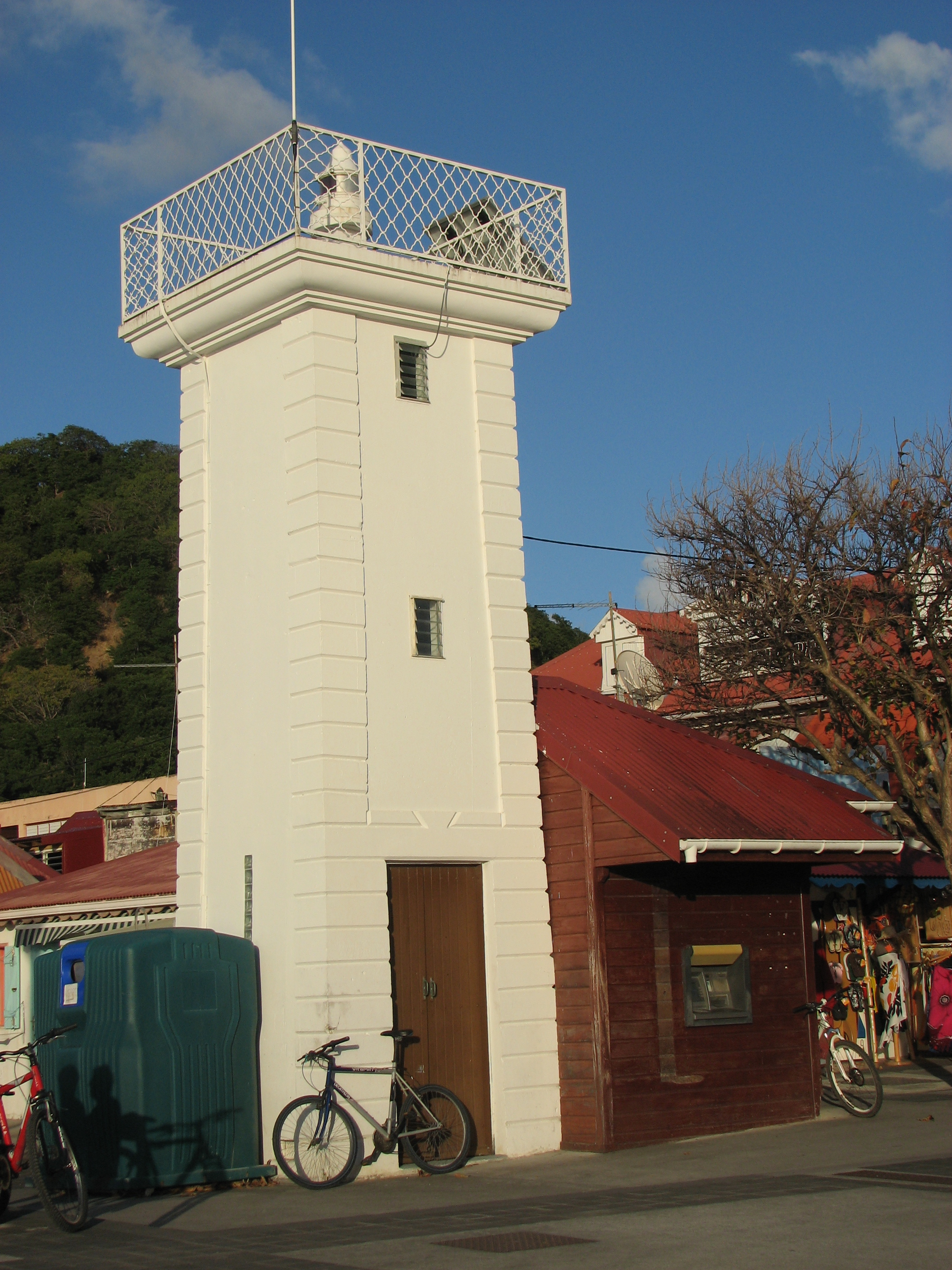 Phare de Terre-de-Haut (Les Saintes, Guadeloupe)